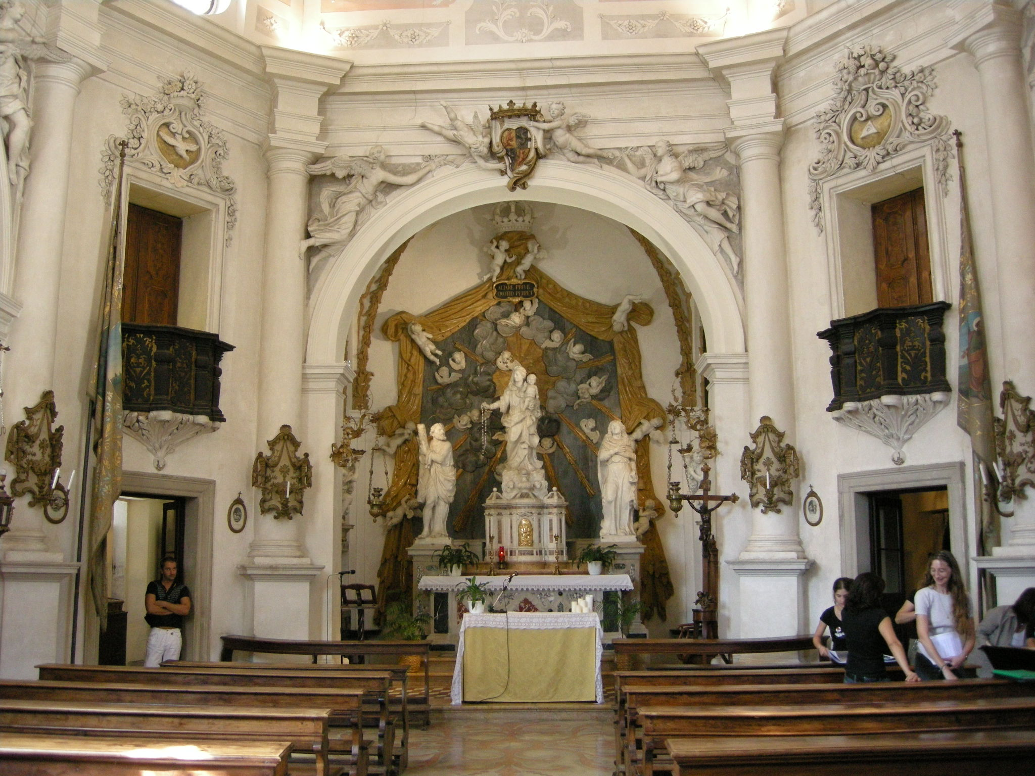 Villa manin, cappella, Hl, Maria, Ludwig und Andreas (von Pietro Baratta)